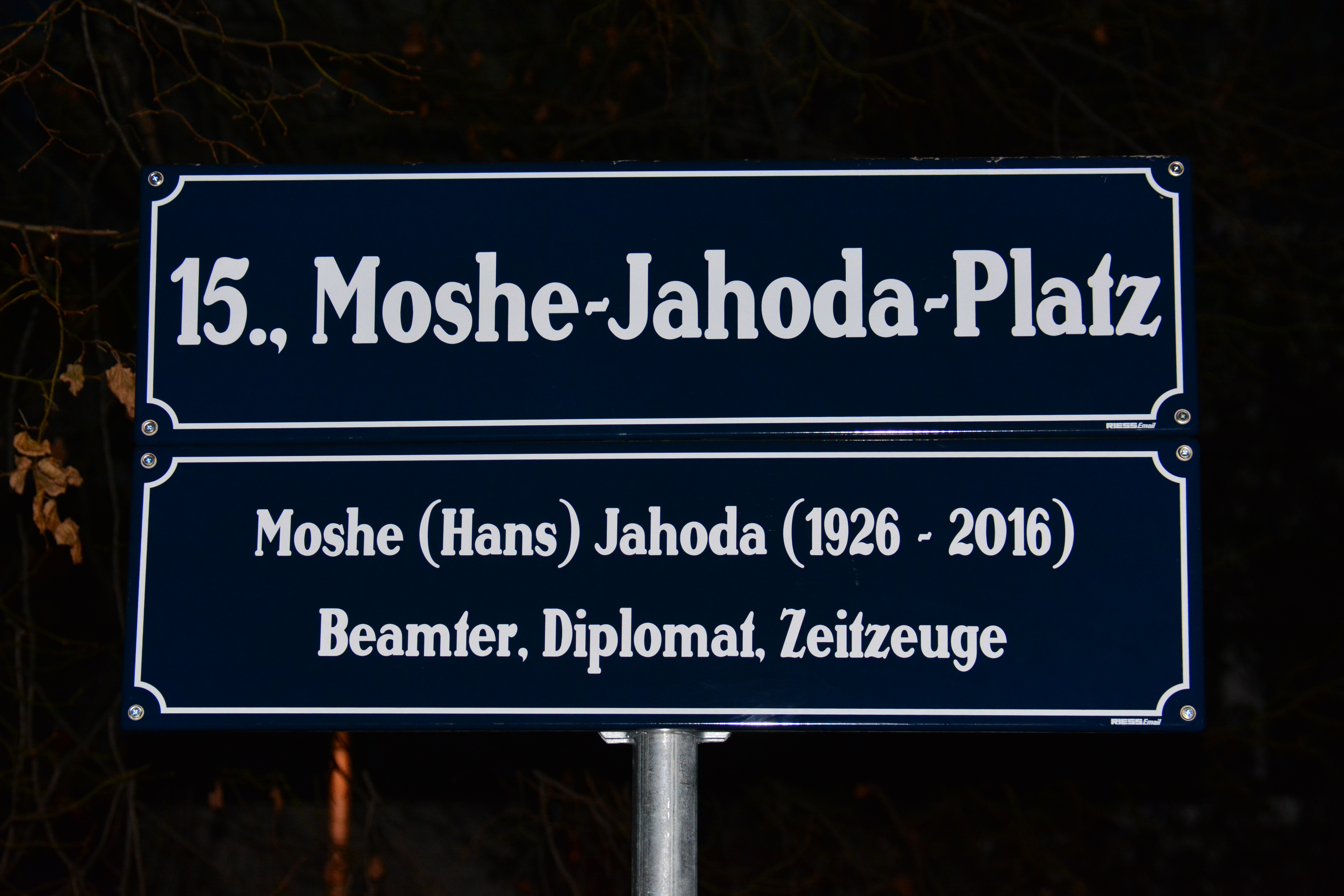 Straßenschild Moshe-Jehoda-Platz in Rudolfsheim-Fünfhaus, Wien, benannt am 7. November 2018